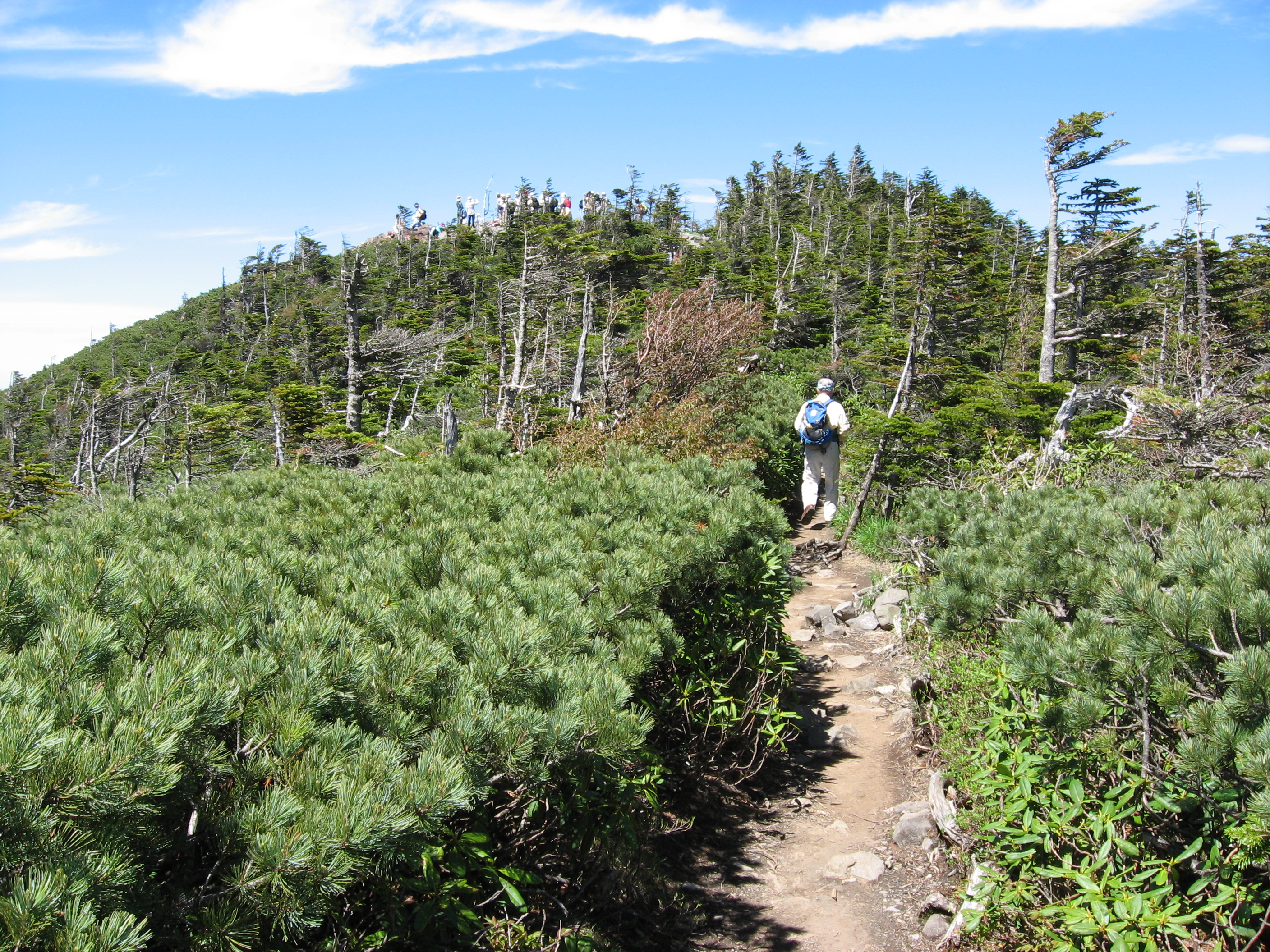 北横岳南峰から北峰にかけての登山道